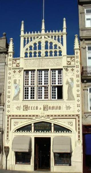 Librería Lello e Irmão, en Oporto, Portugal